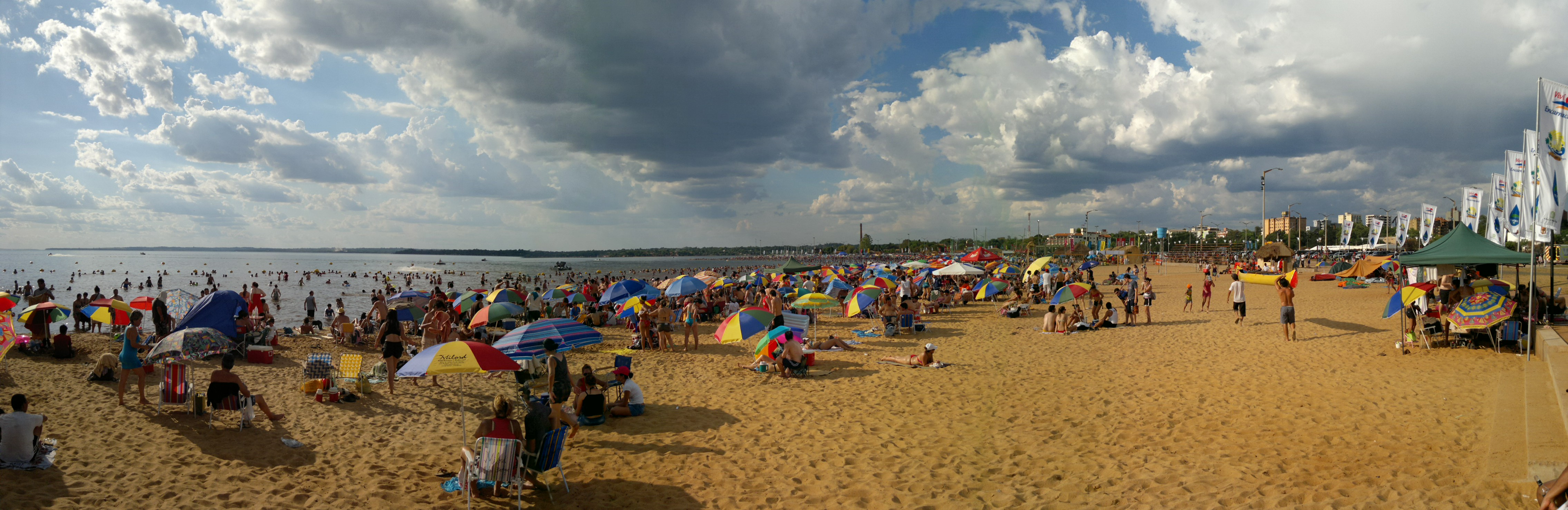 Playas de Encarnación - Verano